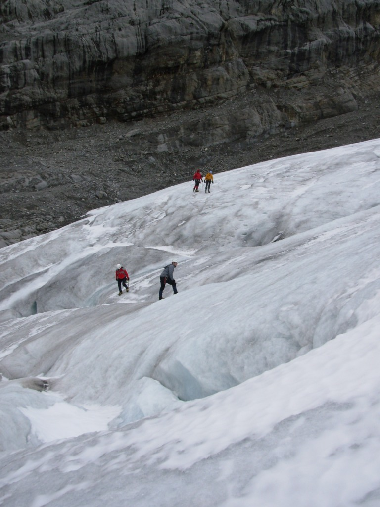 Bergsteiger im unteren Bereich des Gletschers